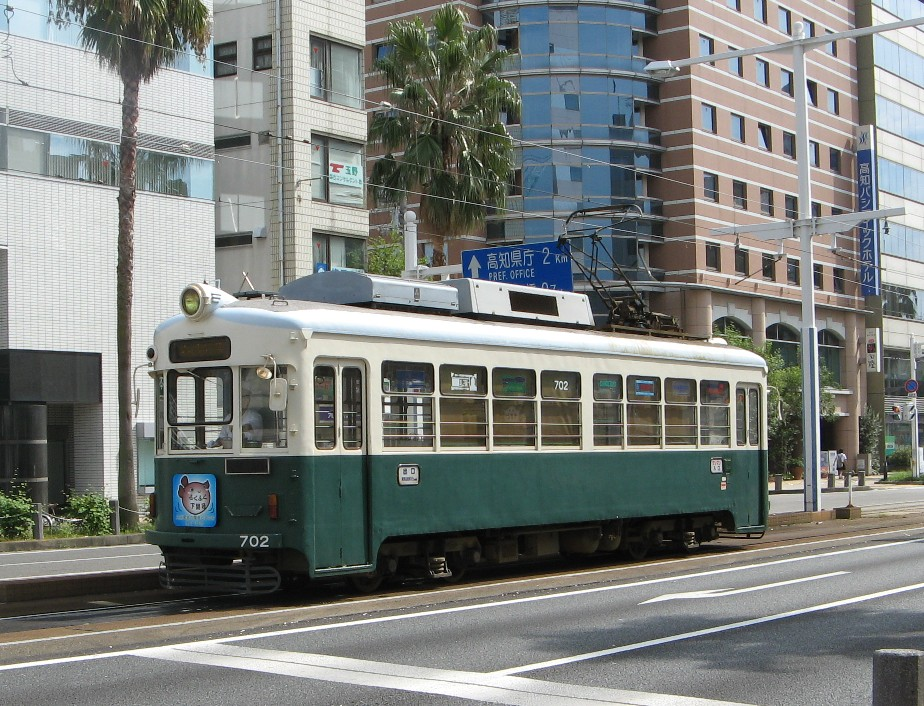 土佐電気鉄道702号車 高知駅前付近にて撮影